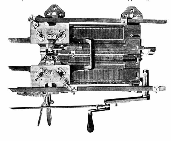 Erste Flachstrickmaschine für LL-Bindungen (1900)